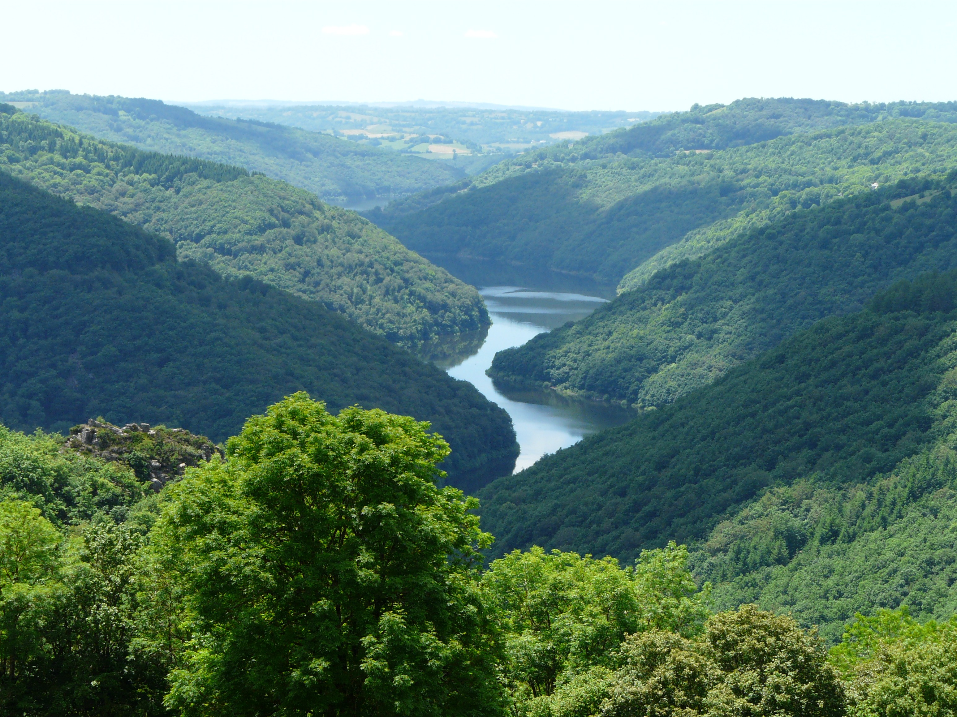 Le lac de retenue du barrage de Sarrans, gorges de la Truyère vues depuis la commune de Paulhenc, Cantal, France.